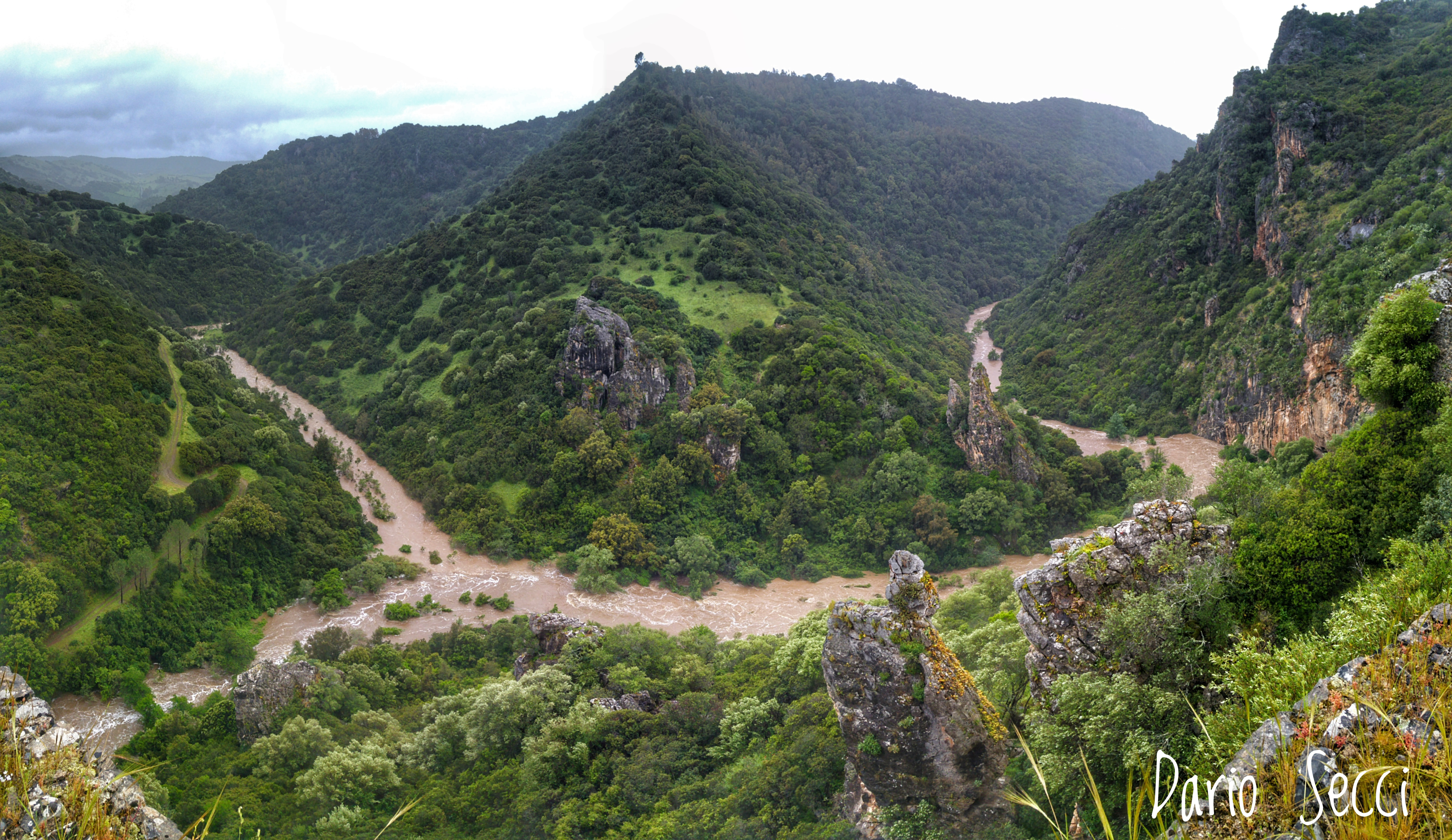 Rio Araxisi alla confluenza con il Bidissàriu, durante la piena del maggio 2018.